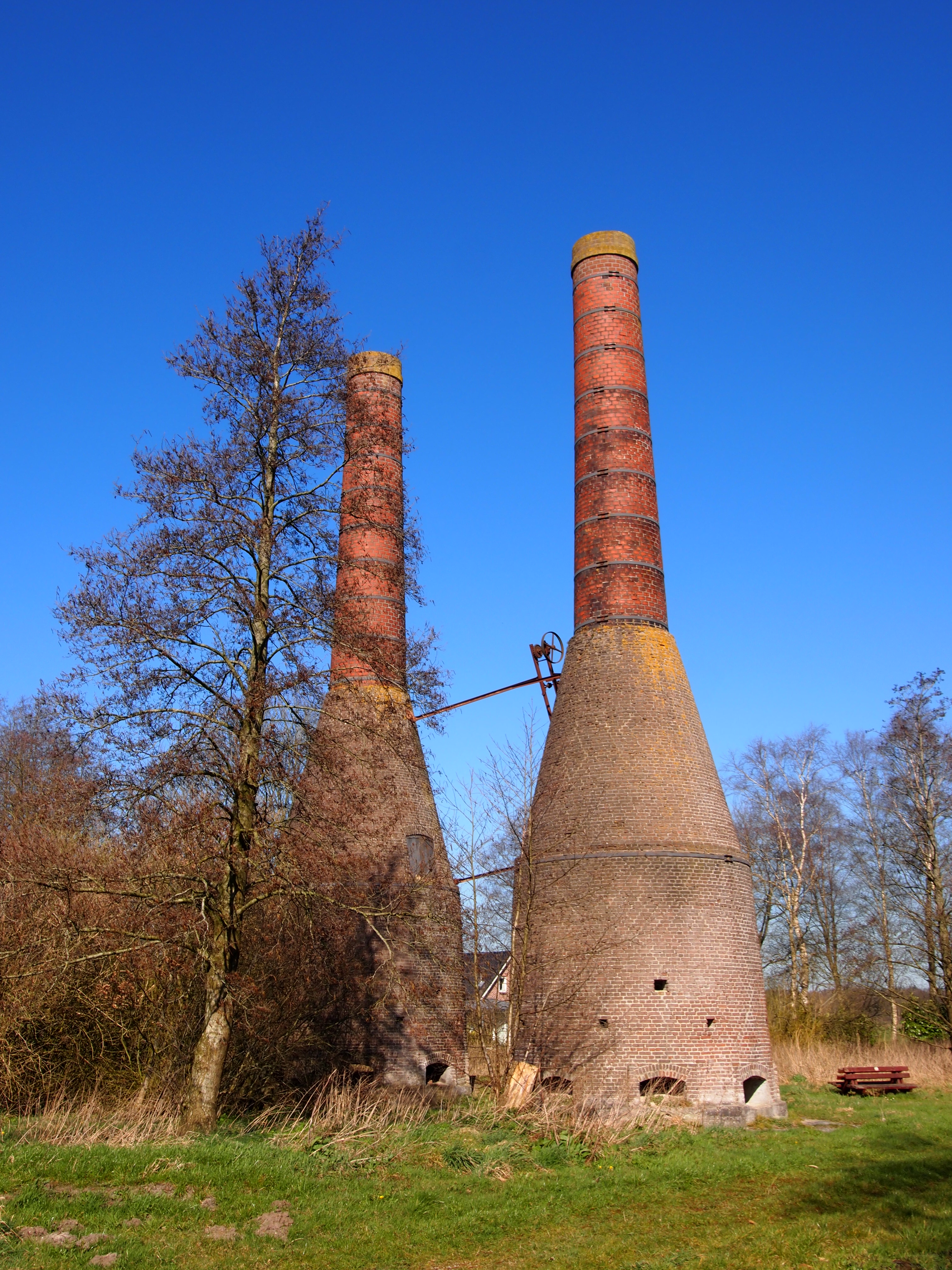 Dieverbrug, Restanten van een kalkovencomplex